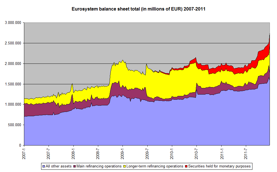 Verloop balanstotaal ECB van begin 2007 tot eind 2011, voor gebruik in Kredietcrisis op :nl, welk artikel tot eind 2011 gaat.